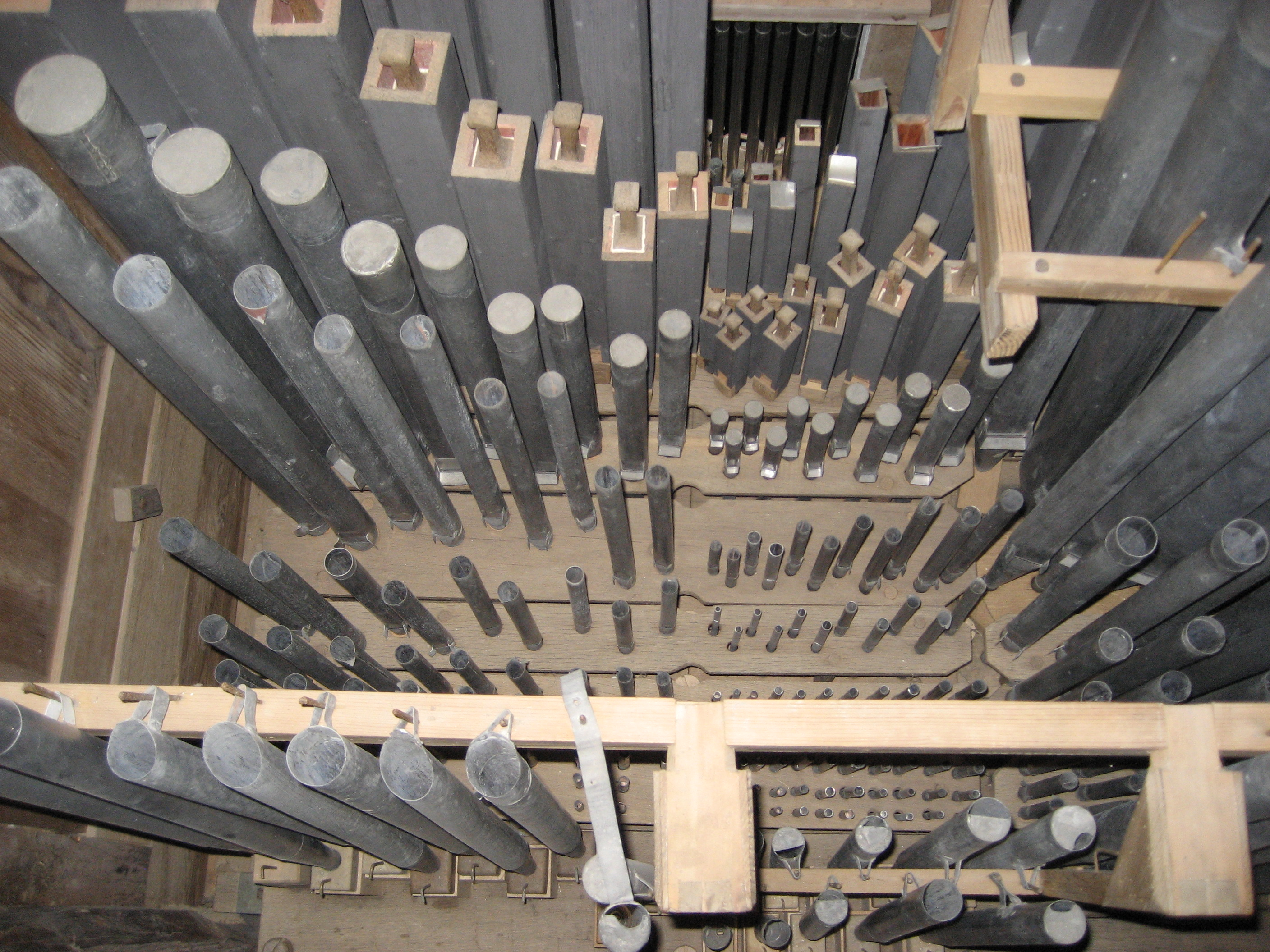 Ansicht des inneren Pfeifenwerkes